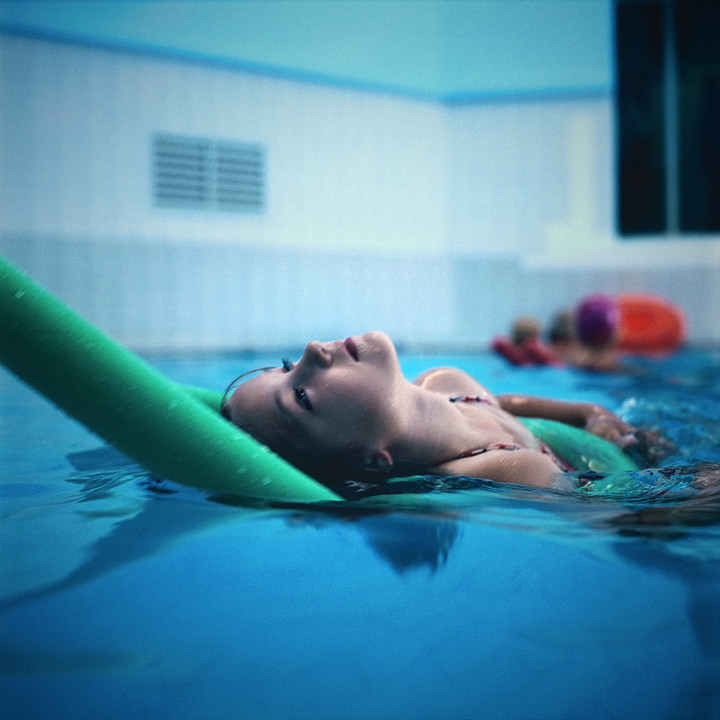 Kristýna Erbenová, fotografické dílo